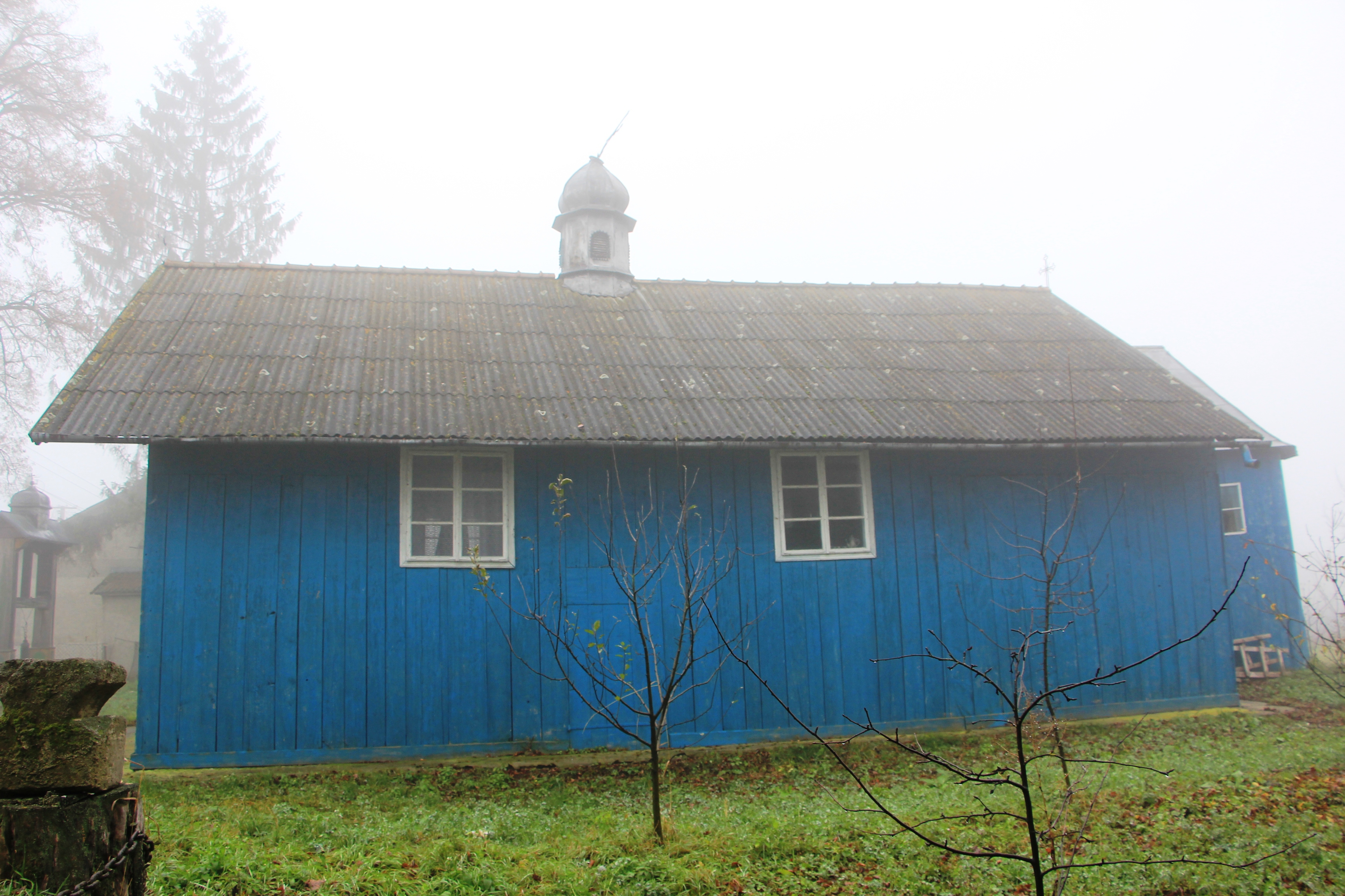 Церква св. Параскеви Терновської 1860